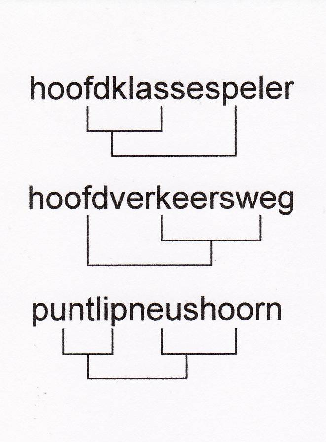 Word structure tree